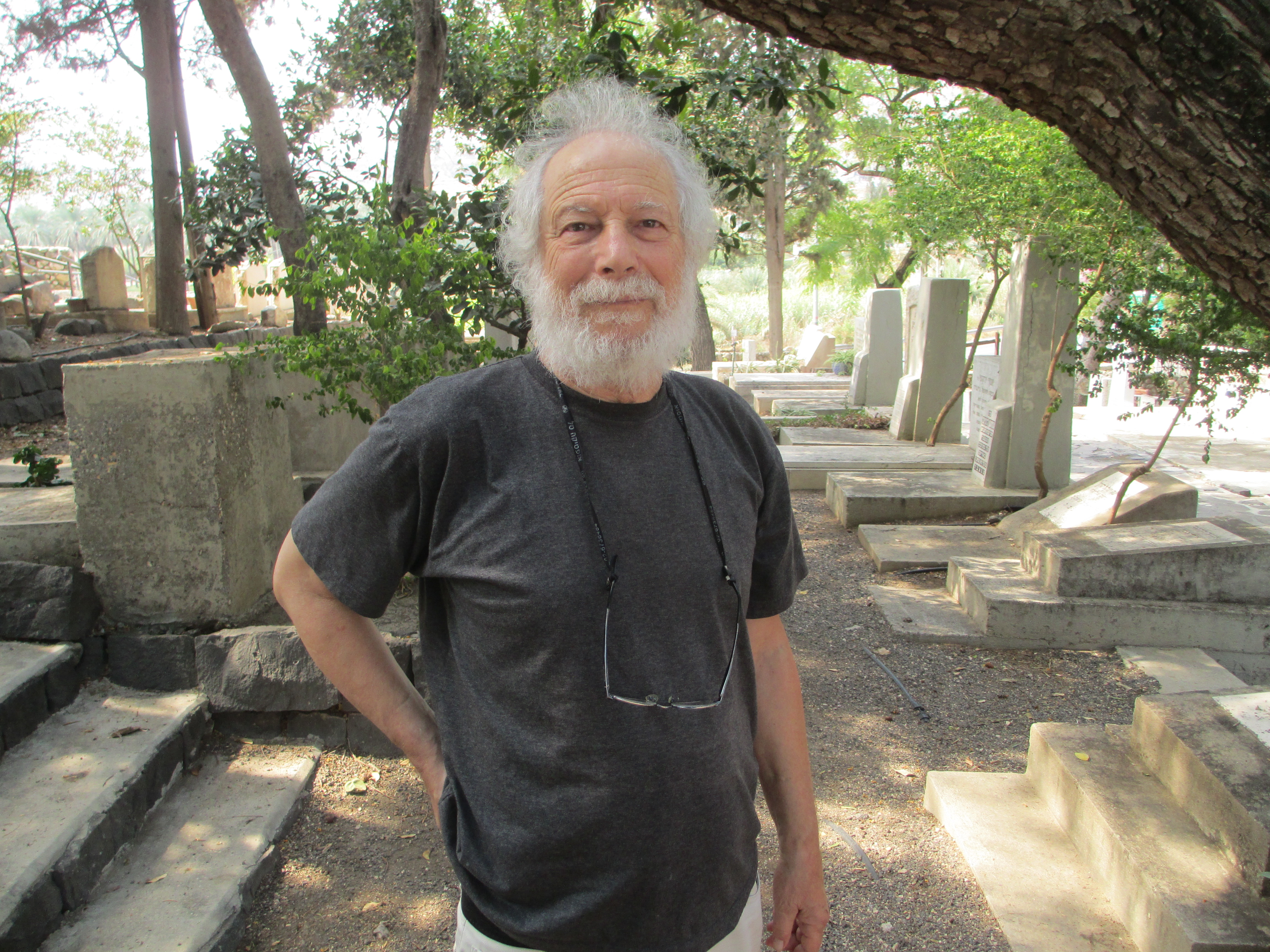 יעקב (יענקל'ה) רוטבליט